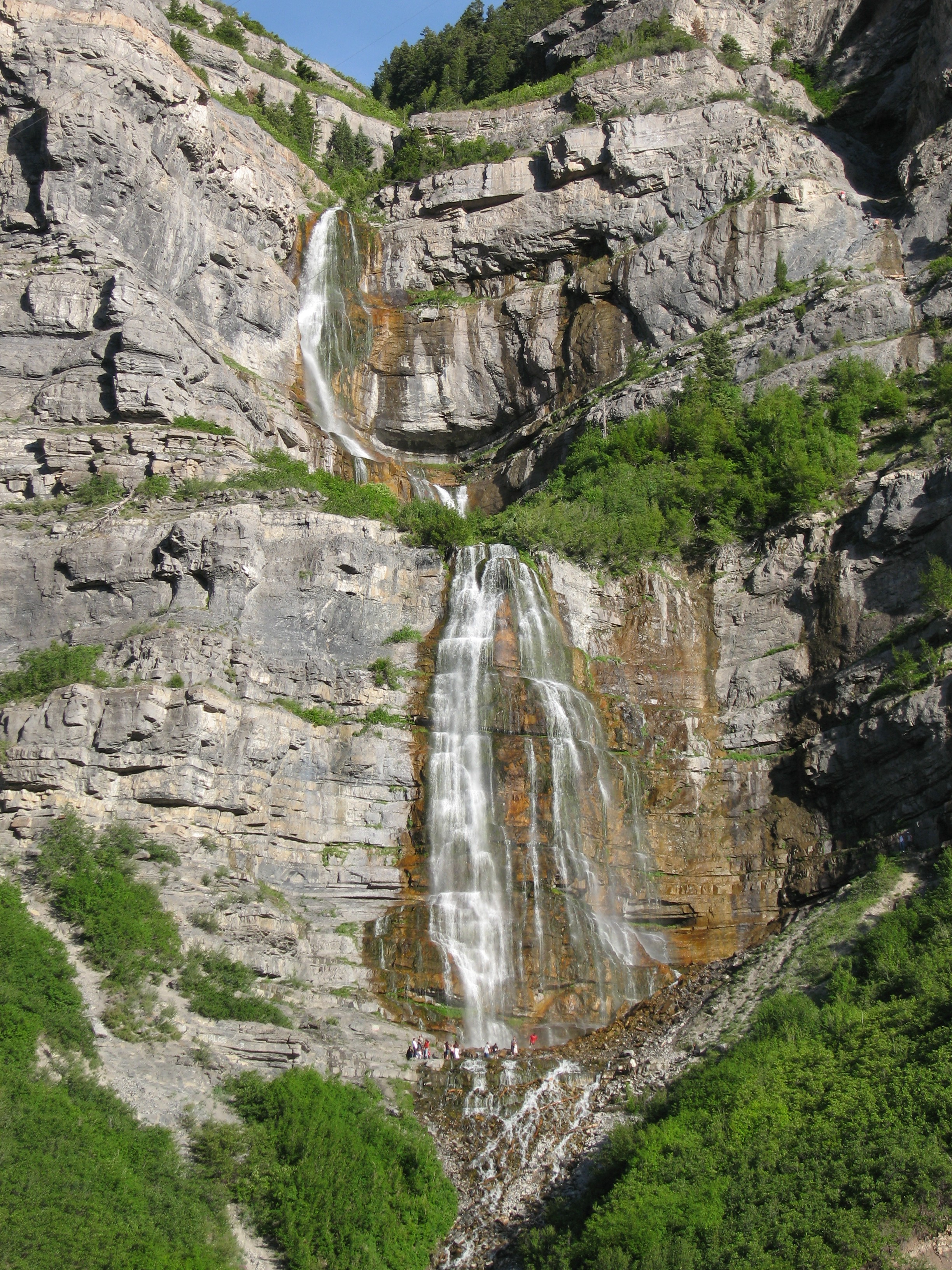 Bridal Veil Falls, Provo, Utah, USA